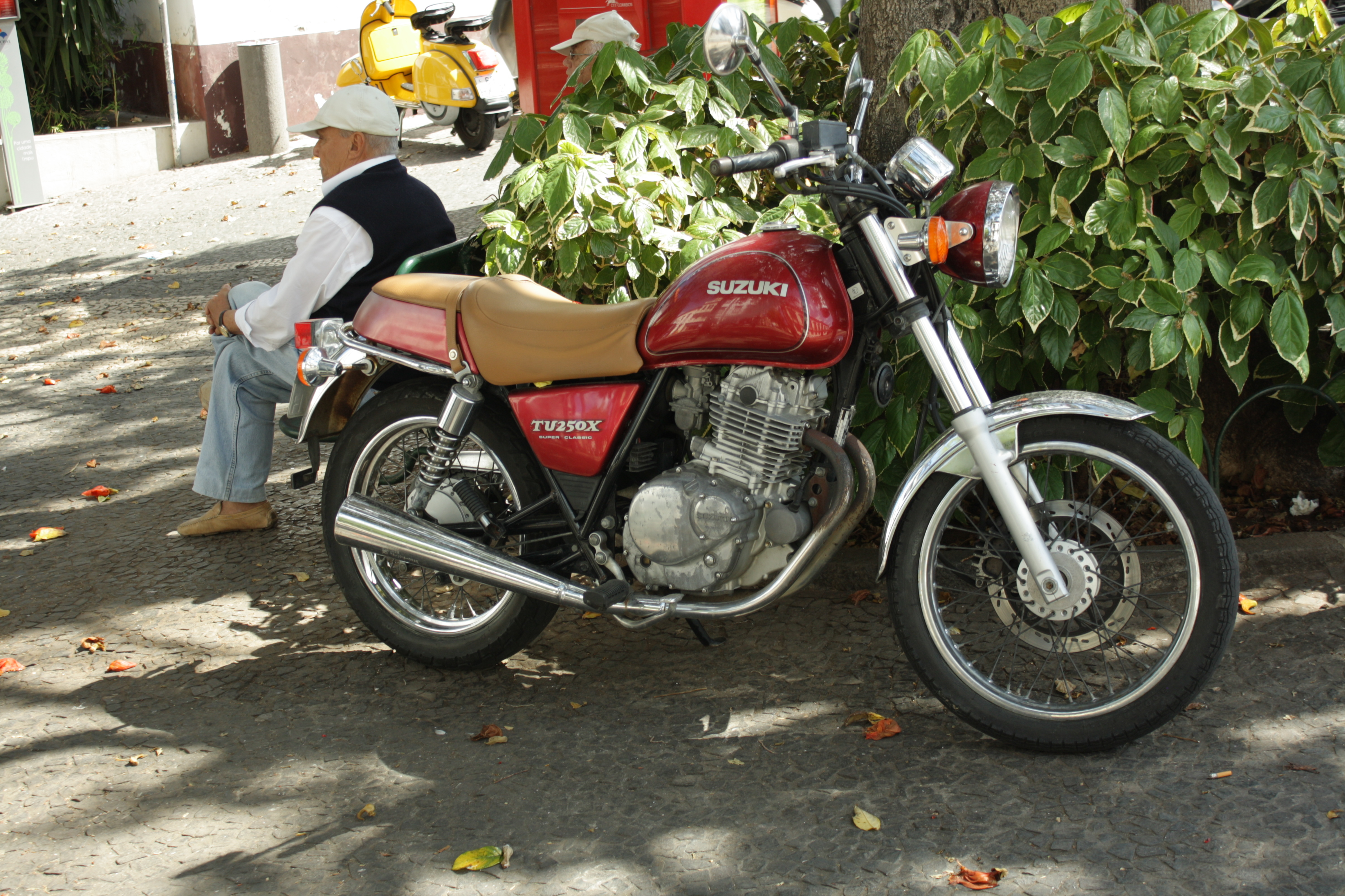 Suzuki TU250X